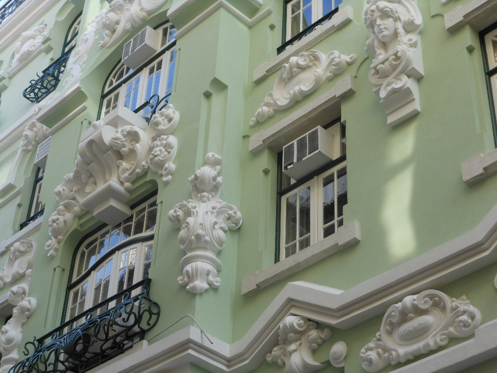 Upmarket Lisbon